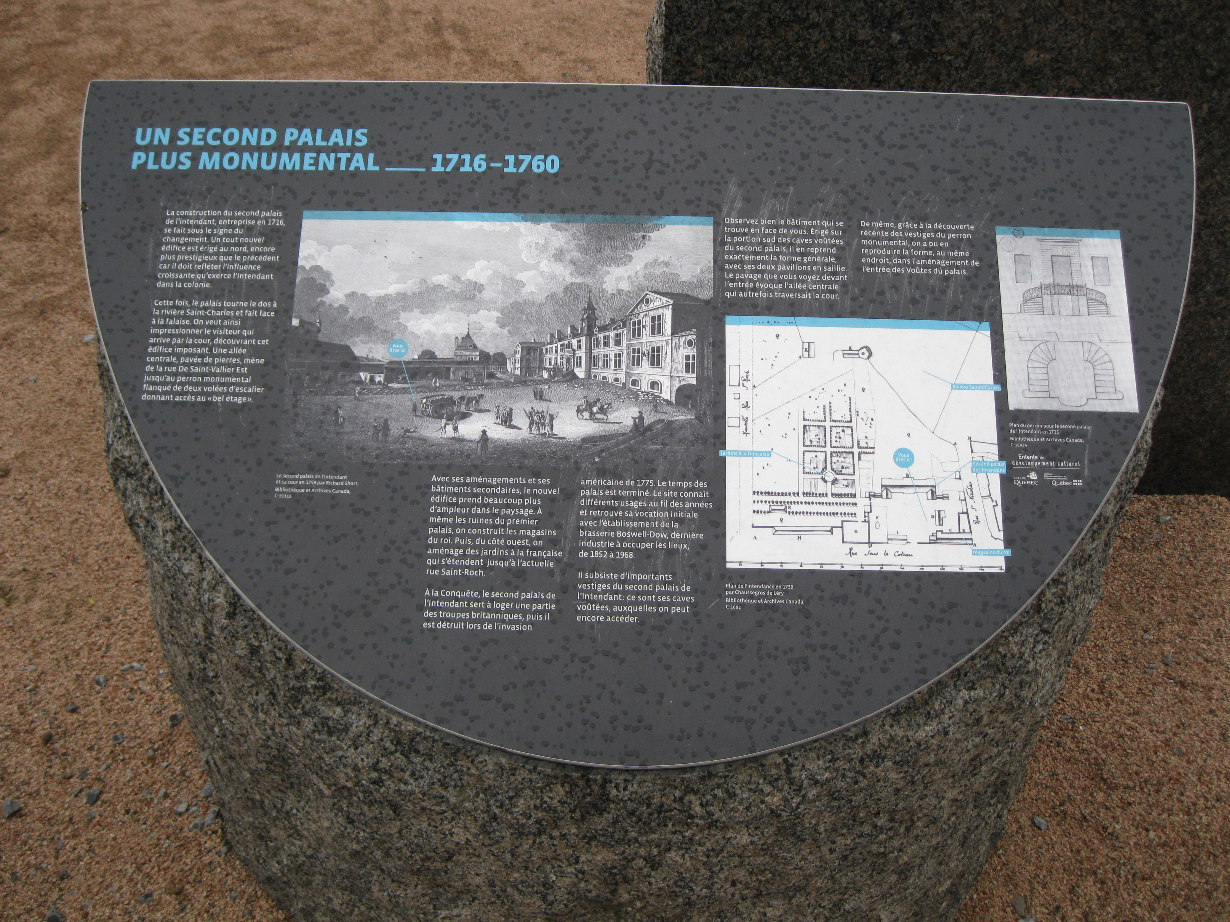 L'îlot des Palais est un parc urbain de Québec sur un site archéologique. Il demeure à cet endroit des vestiges du palais de l'intendant de la Nouvelle-France. Un bâtiment en brique rouge est une ancienne brasserie. radio-canada.ca